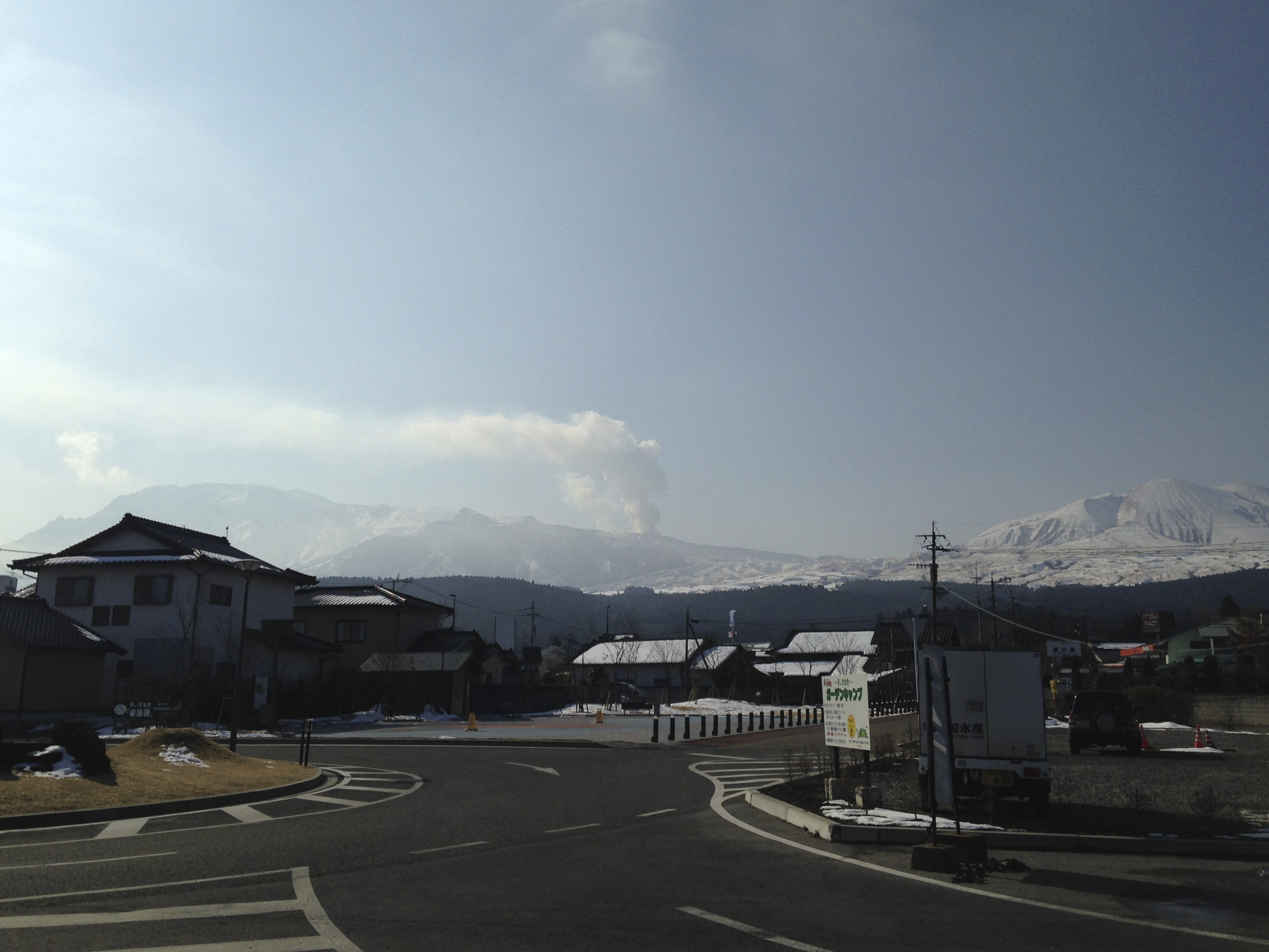 阿蘇駅前の風景と阿蘇山